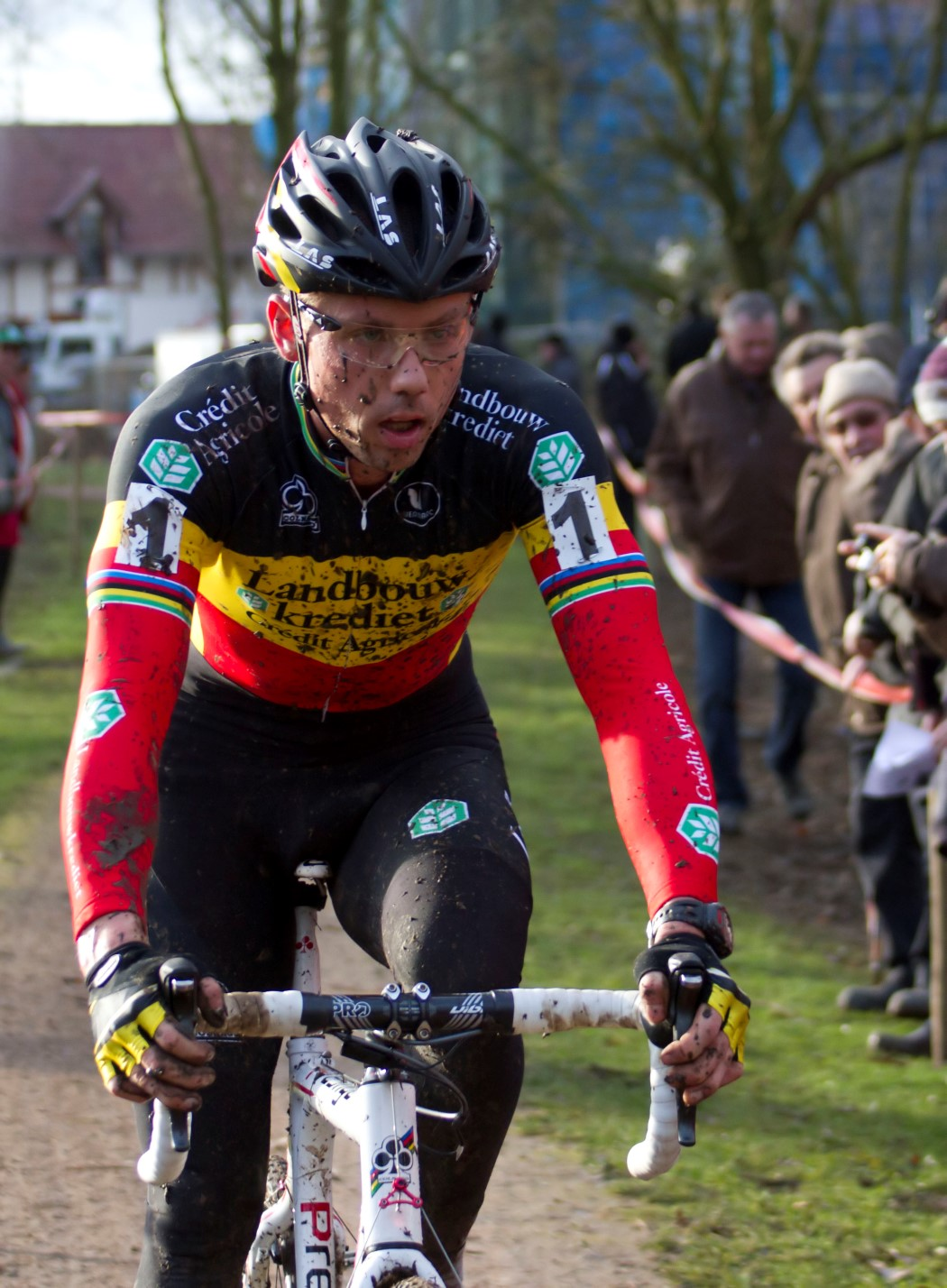 045 nijs